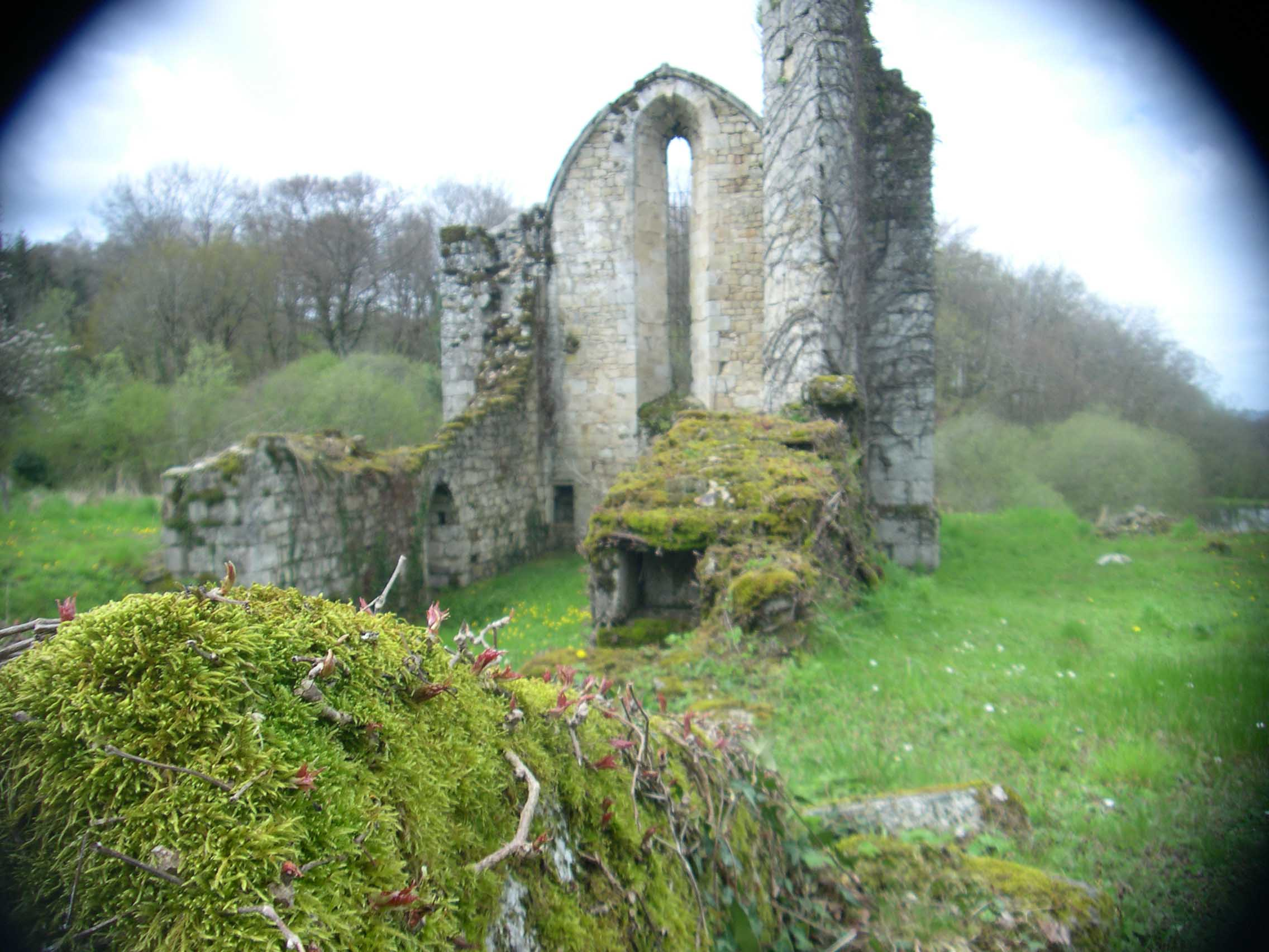 chapelle en ruine de la commanderie templière de Charrières, Creuse, France